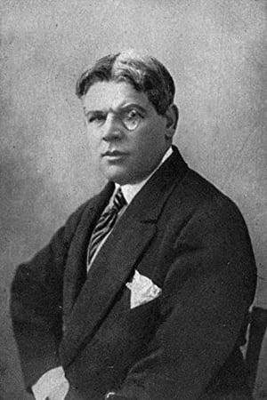 Louis Leubas dans Judex